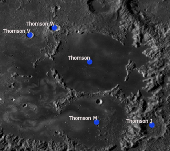 Cráter lunar Tomson. Cráteres satélite. (Imagen LRO)